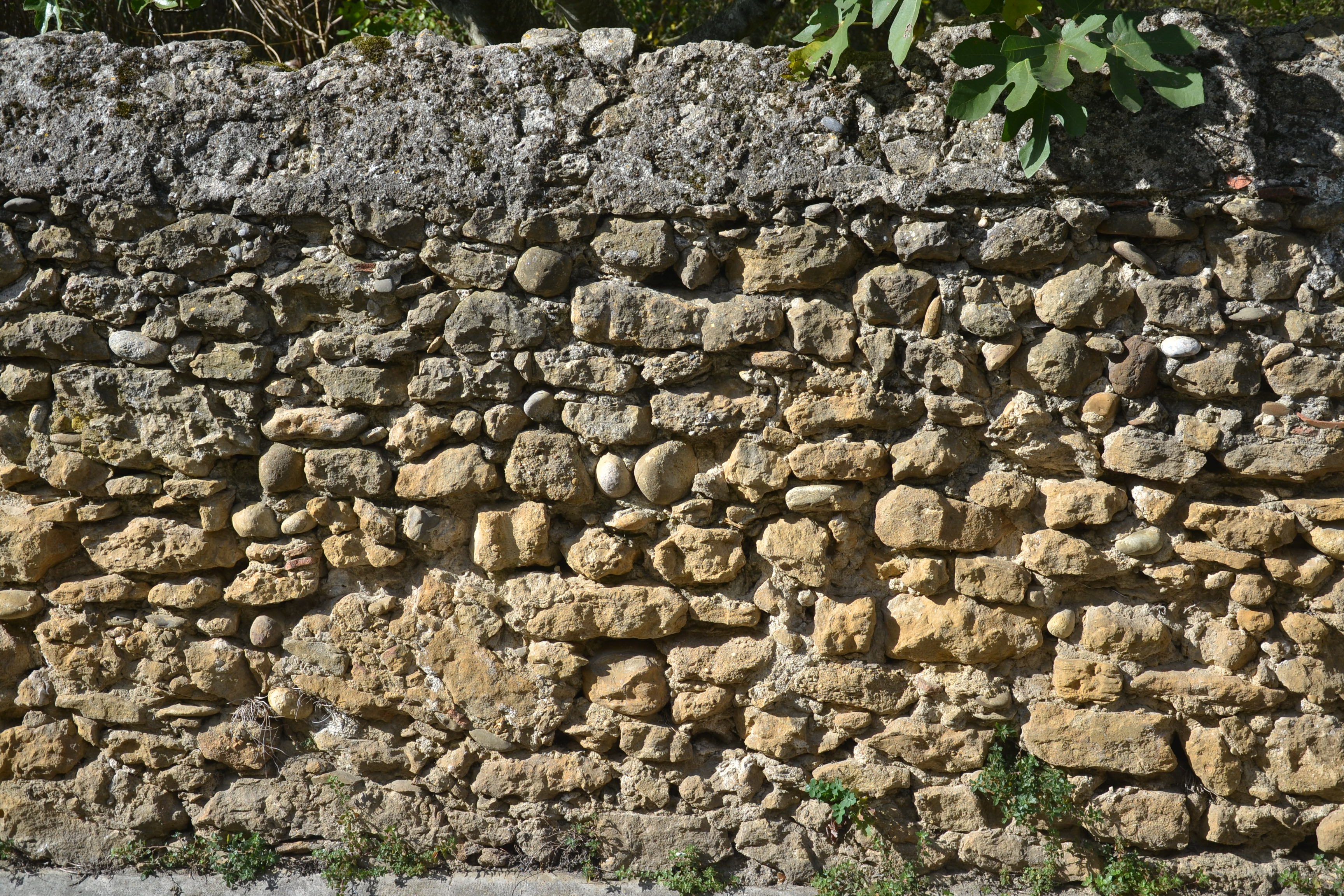 Mur à Vals (Ariège, France).